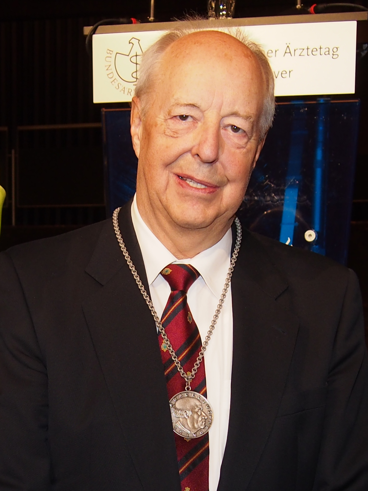 Hans-Joachim Woitowitz anlässlich der Verleihung der Paracelsus-Medaille beim 116. Deutschen Ärztetag in Hannover